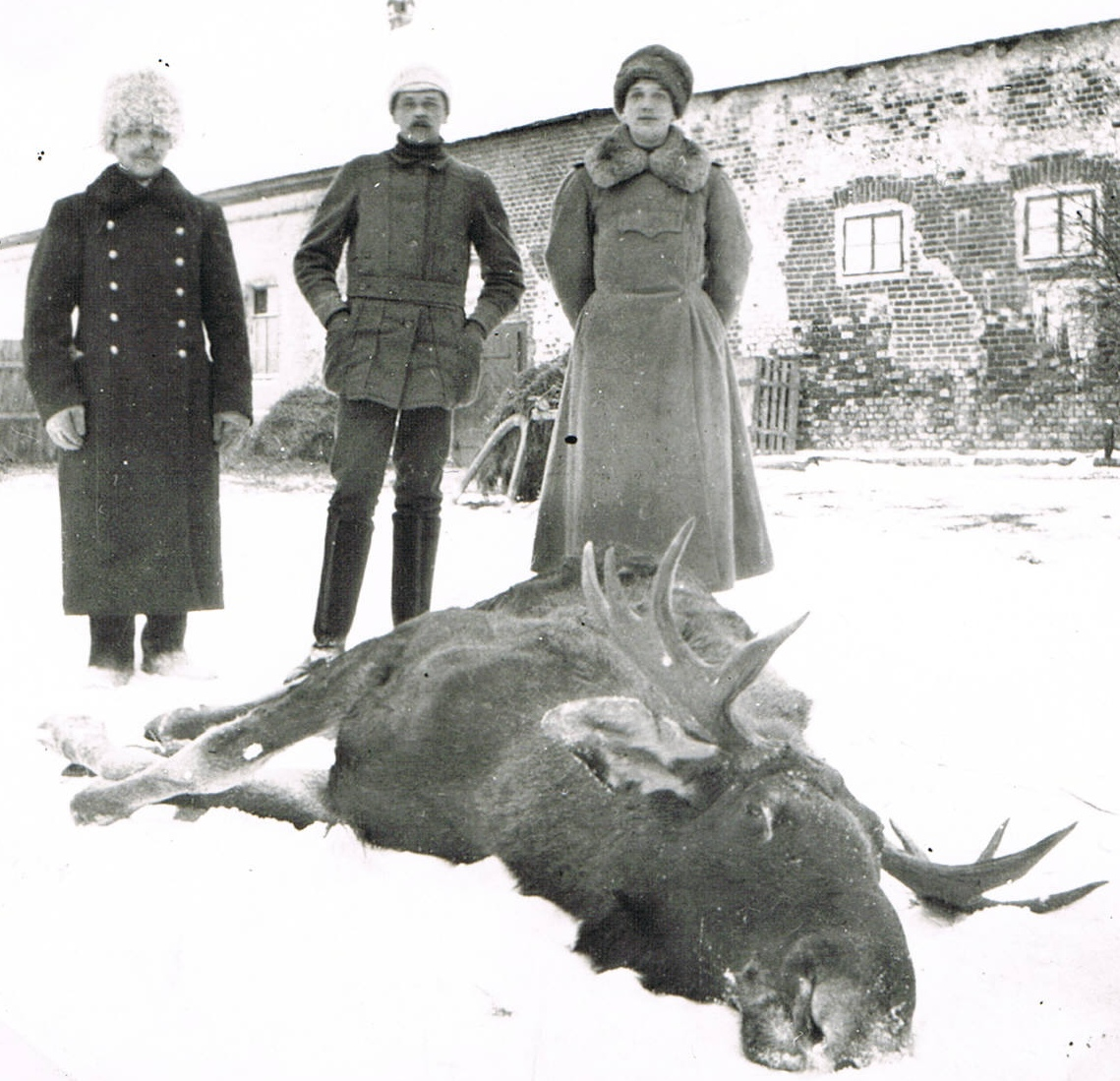 Igor links; Dietrich mitte; ein angestellter rechts